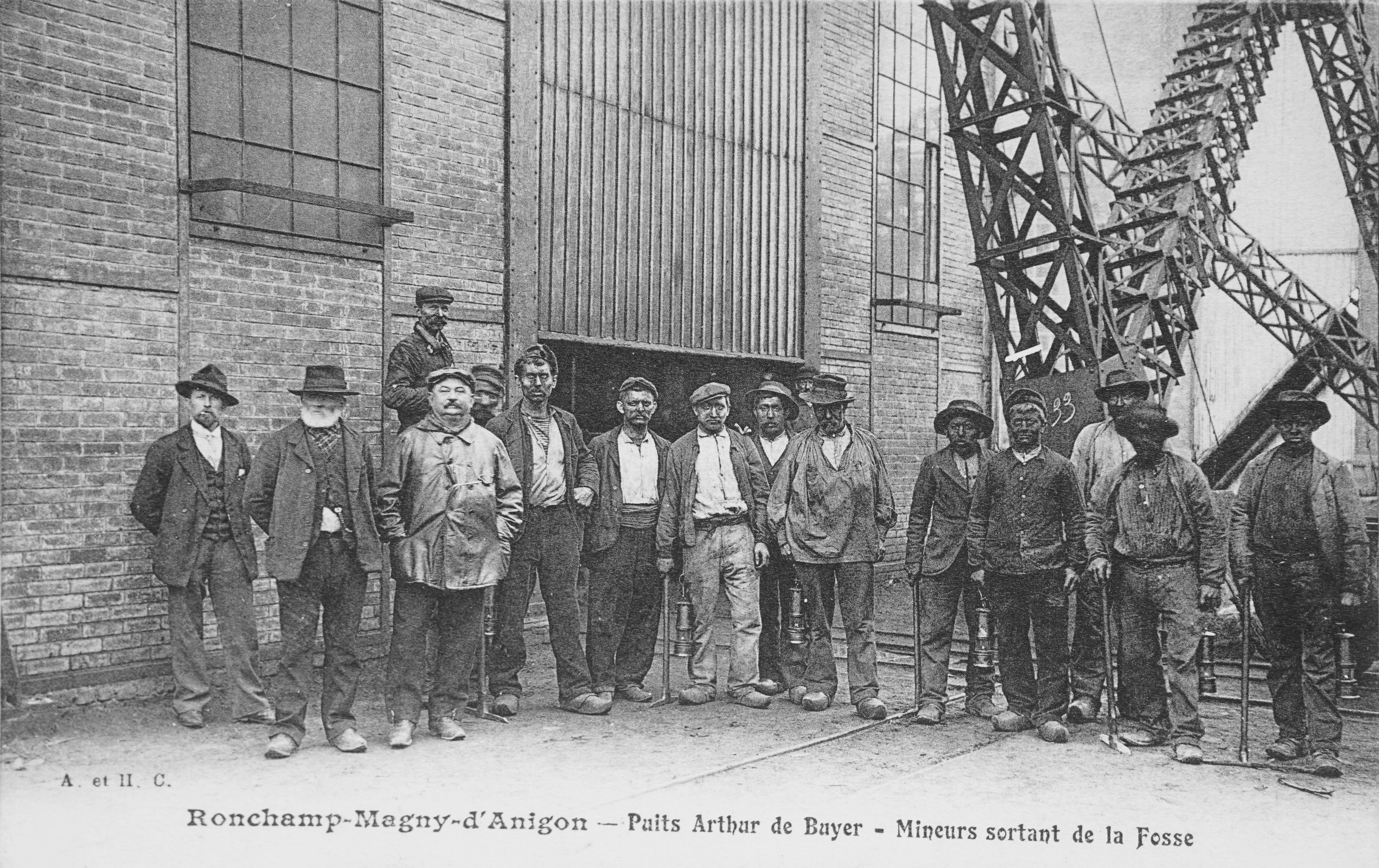 Un groupe de mineur devant le puits A du siège Arthur-de-Buyer (Houillères de Ronchamp).